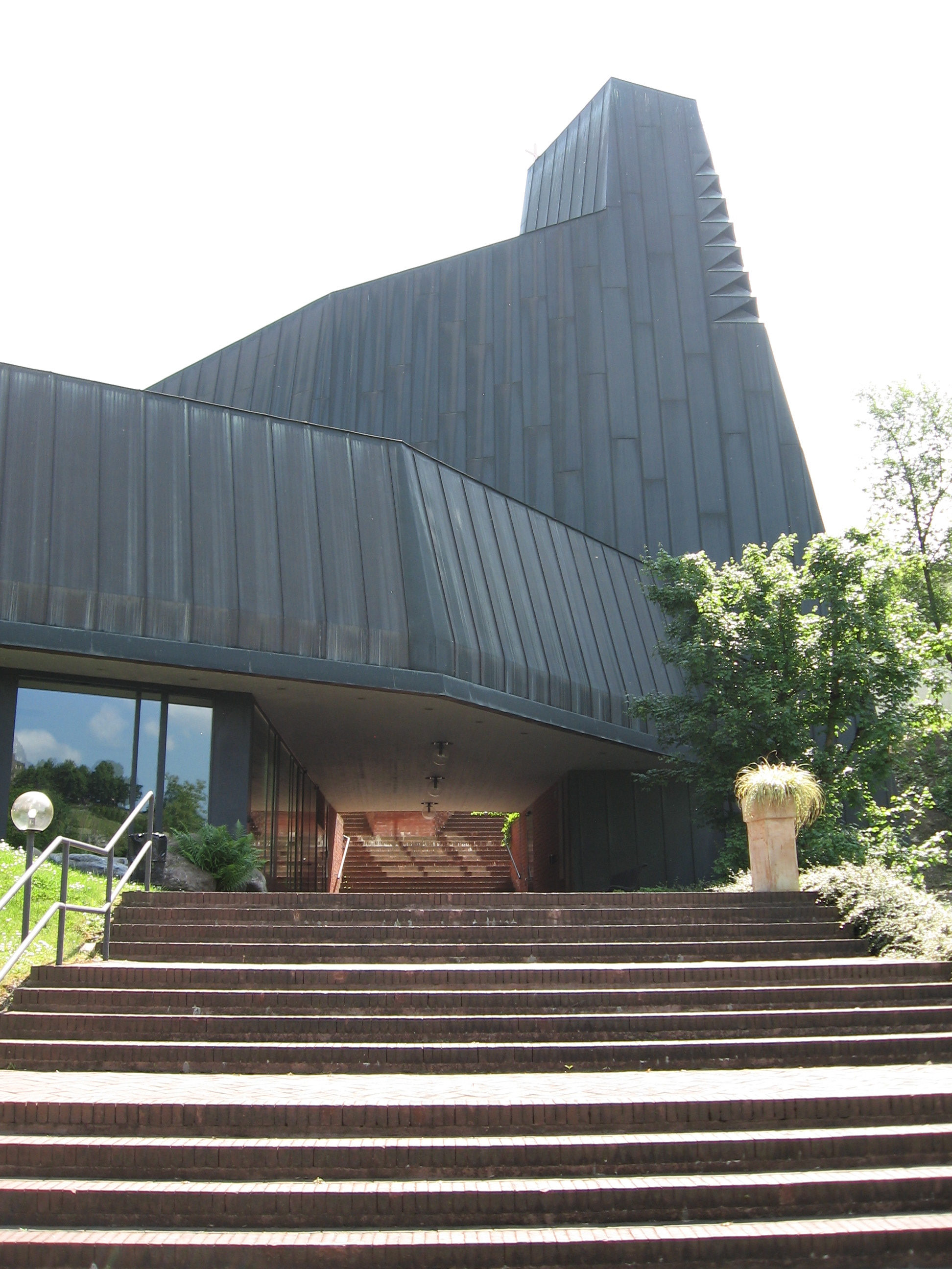 Church St. Antonius in Wildegg (Architect: Justus Dahinden, 1970)